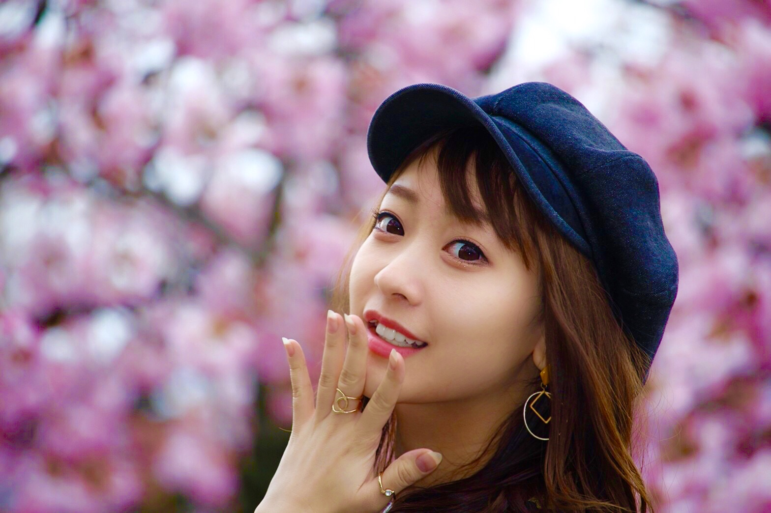 渡邊ちこさん